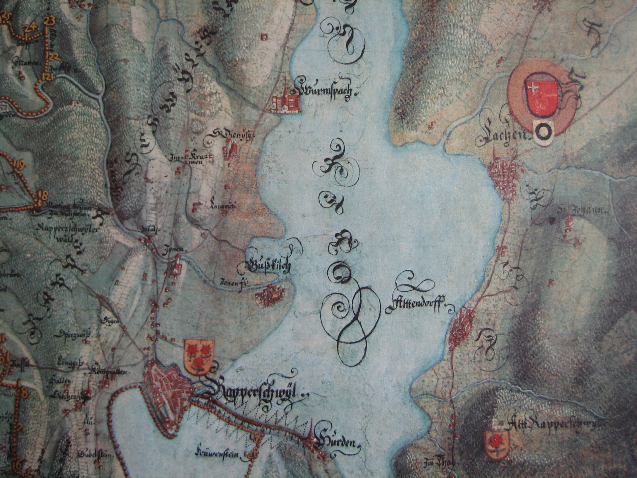 Region Rapperswil/Obersee und Kloster Mariazell-Wurmsbach (SG) auf dem Gygerplan von 1667